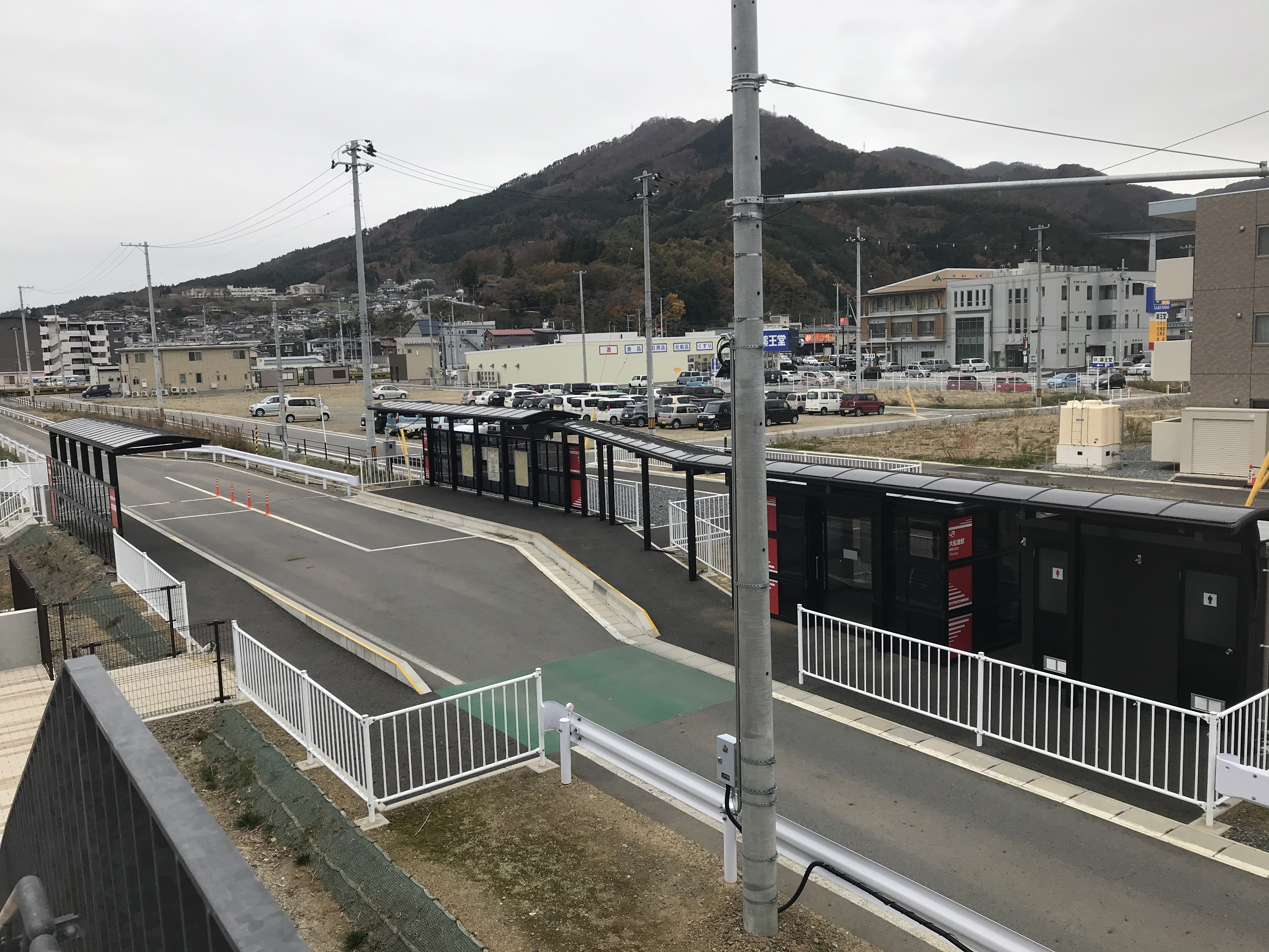 BRT大船渡線 大船渡駅（大船渡市防災観光交流センターから）